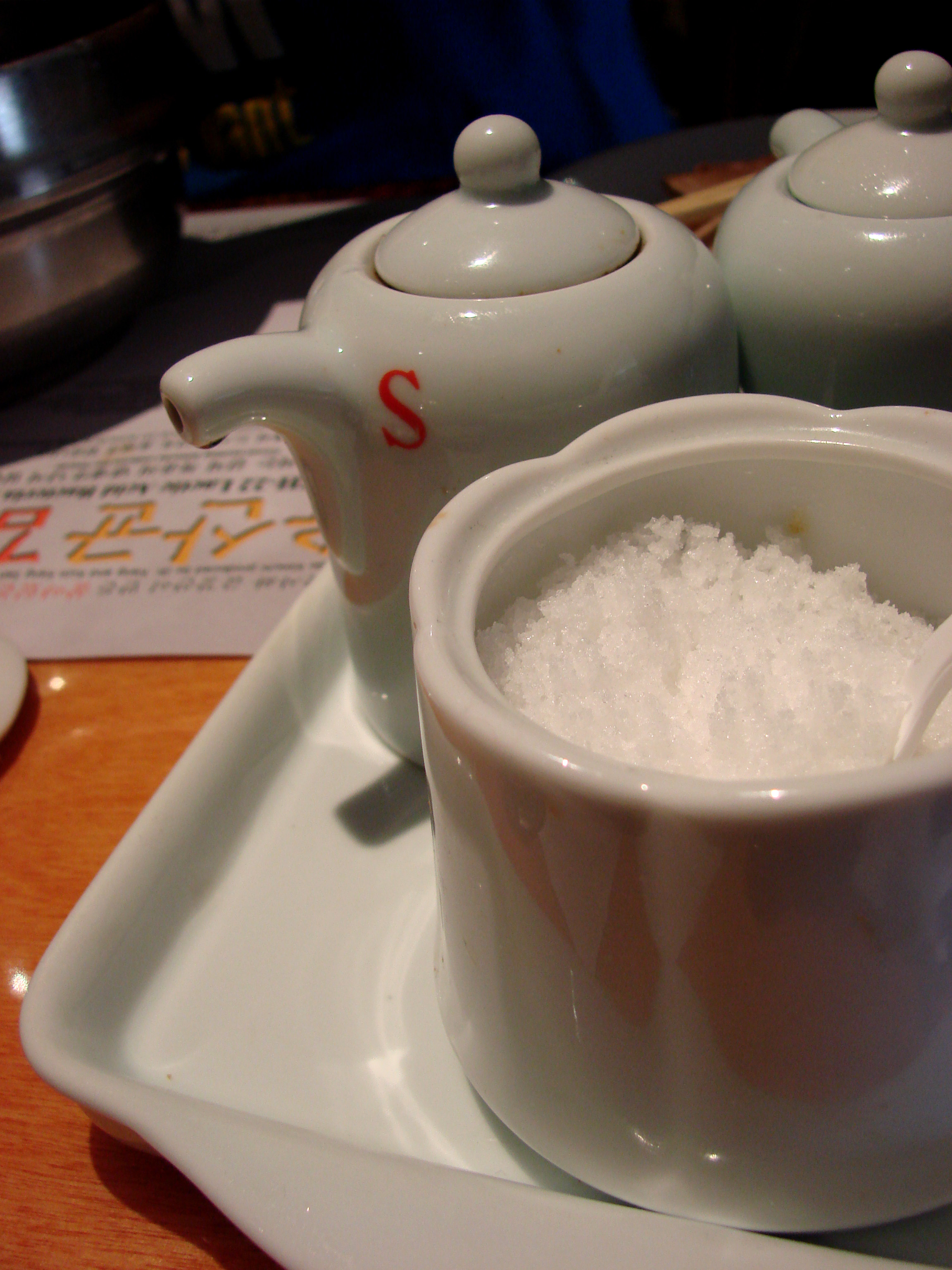 s salt